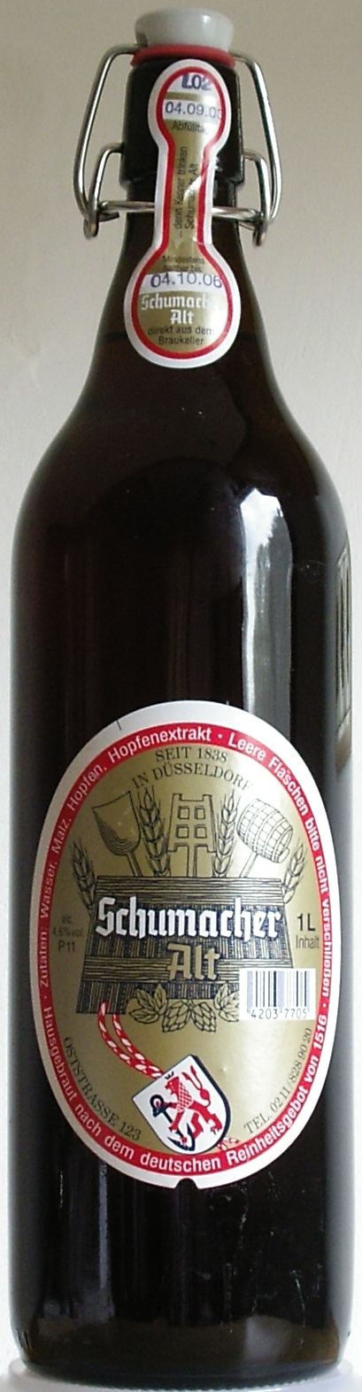 Schumacher Alt - Flasche